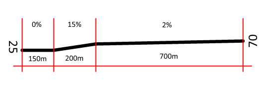 Schema della pendenza dell'Aviosuperficie del Tonale - Passo del Tonale - Vermiglio (TN)